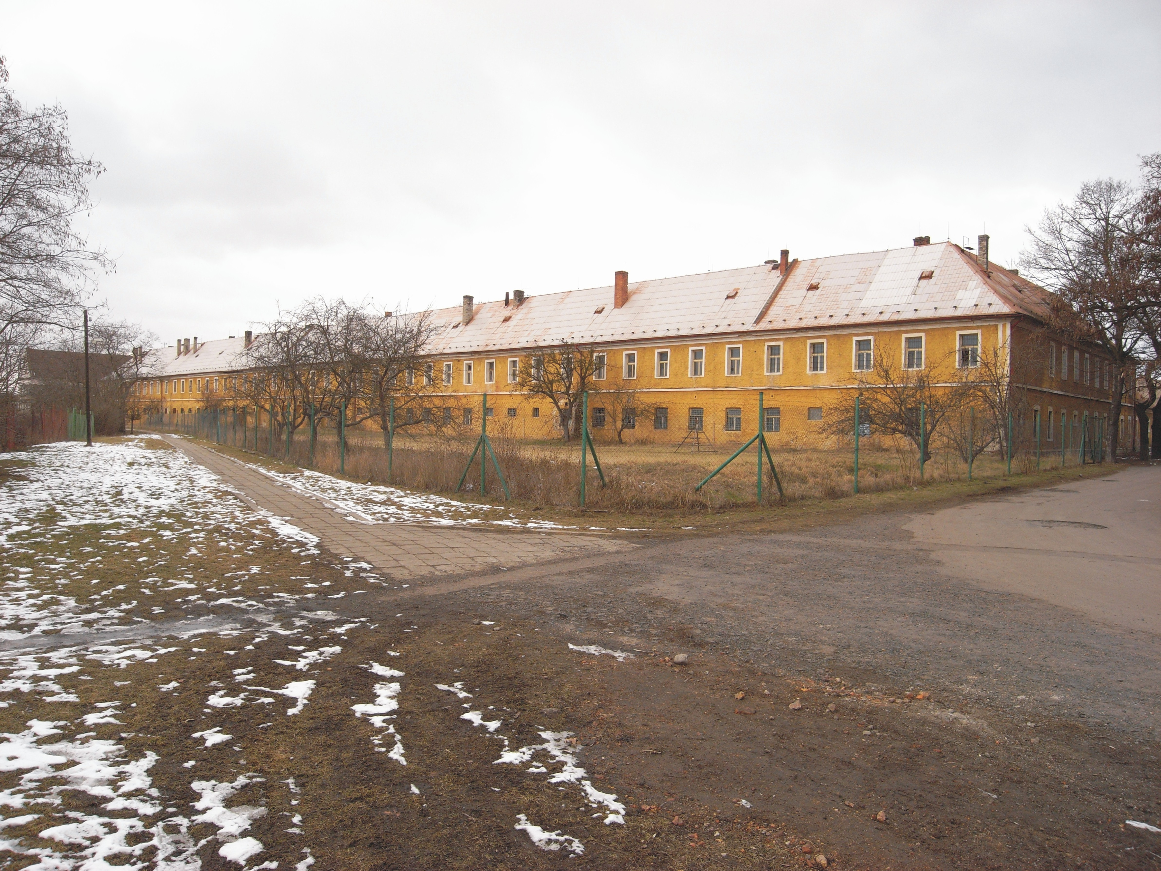 Kasernen in Postoloprty / Postelberg (Nordböhmen, Tschechische Republik)Bis 1918 k.k. Landwehr-Daragonerkaserne